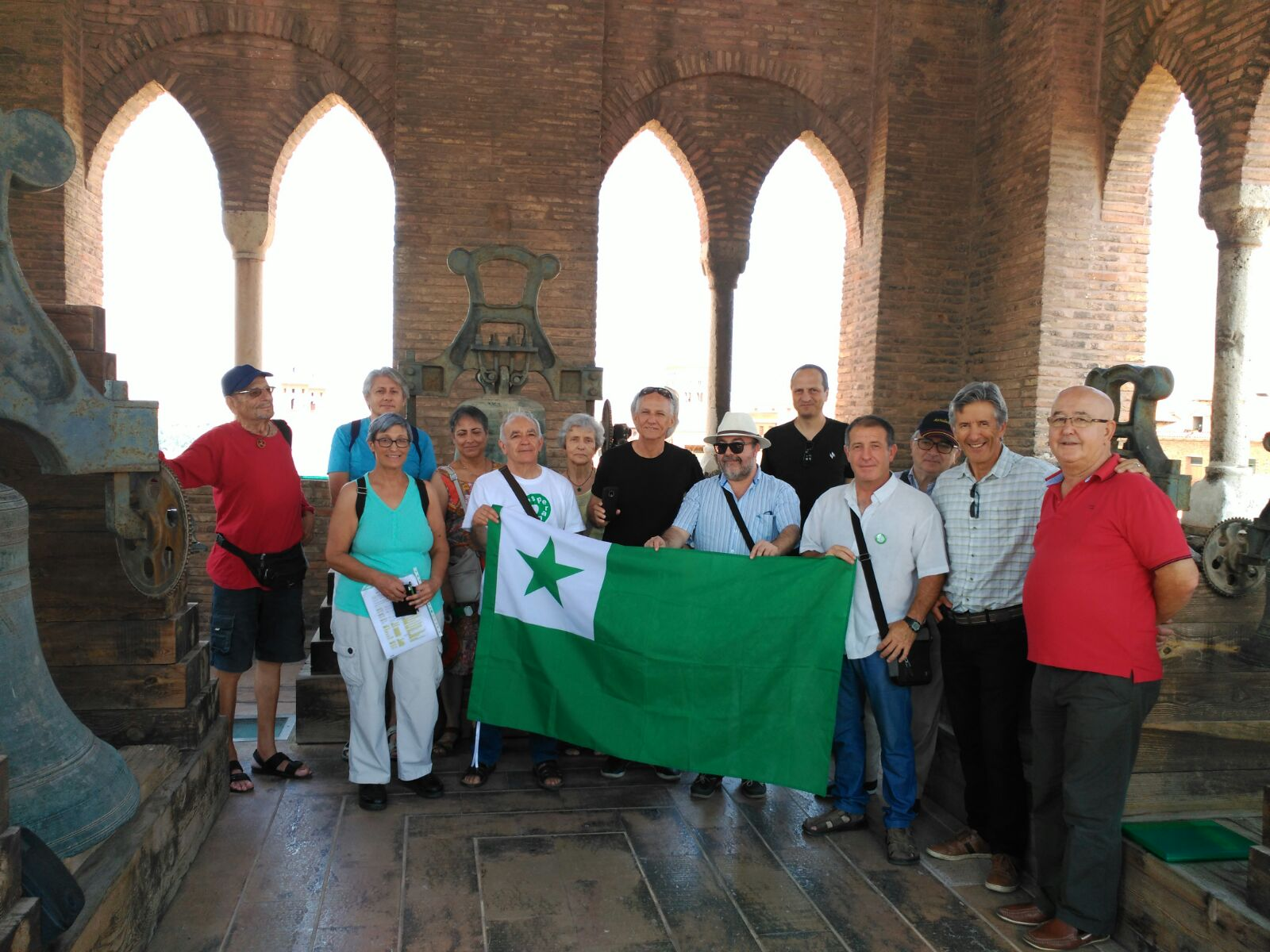 Vizito al la Turo de la Savinto